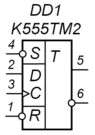 D-триггер К555ТМ2